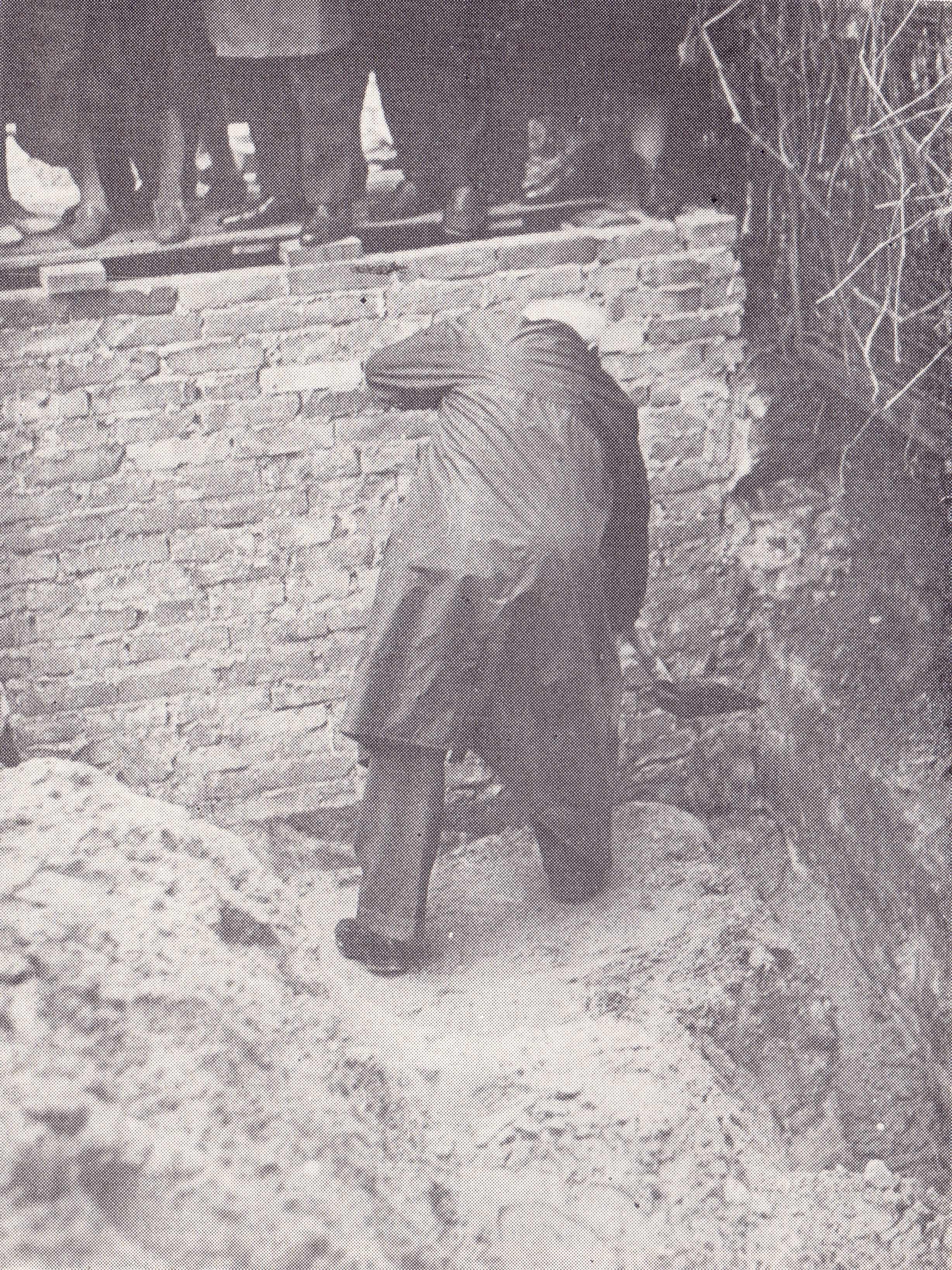 Stanisław Krakiewicz podczas uroczystości zakładania kamienia węgielnego pod budowę kaplicy w Warszawie (czerwiec 1968)